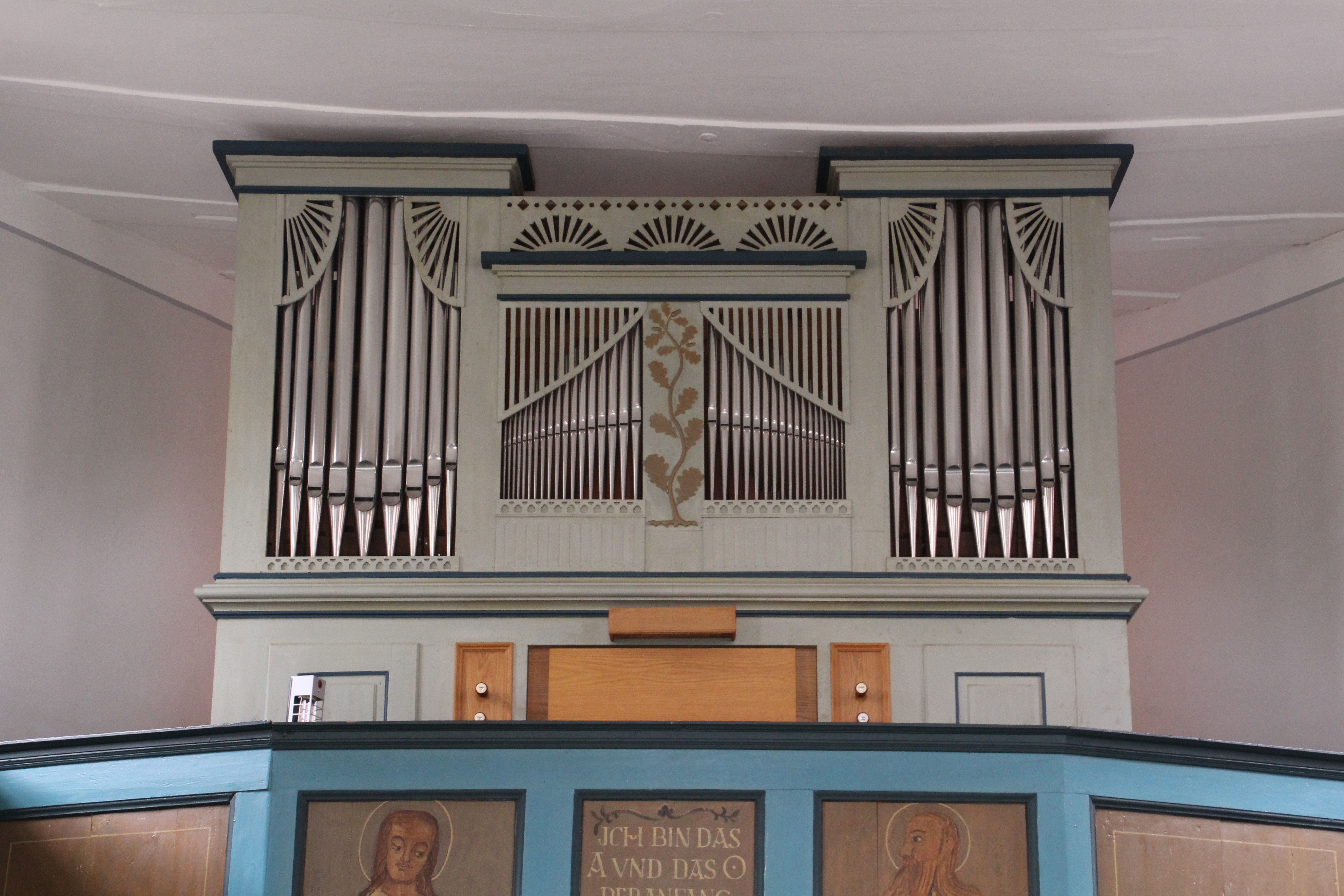 Siehe Bild und Dateiname